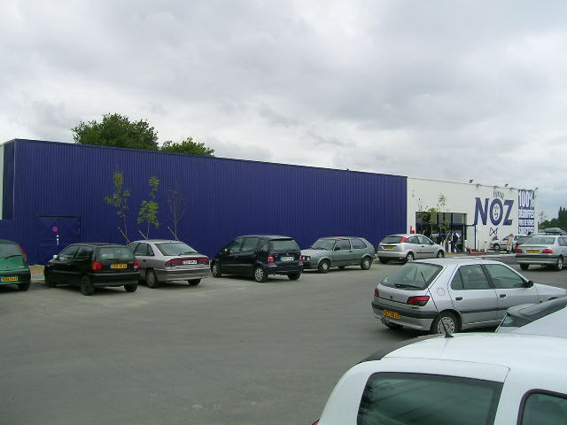 Facade du magasin Noz de Cholet